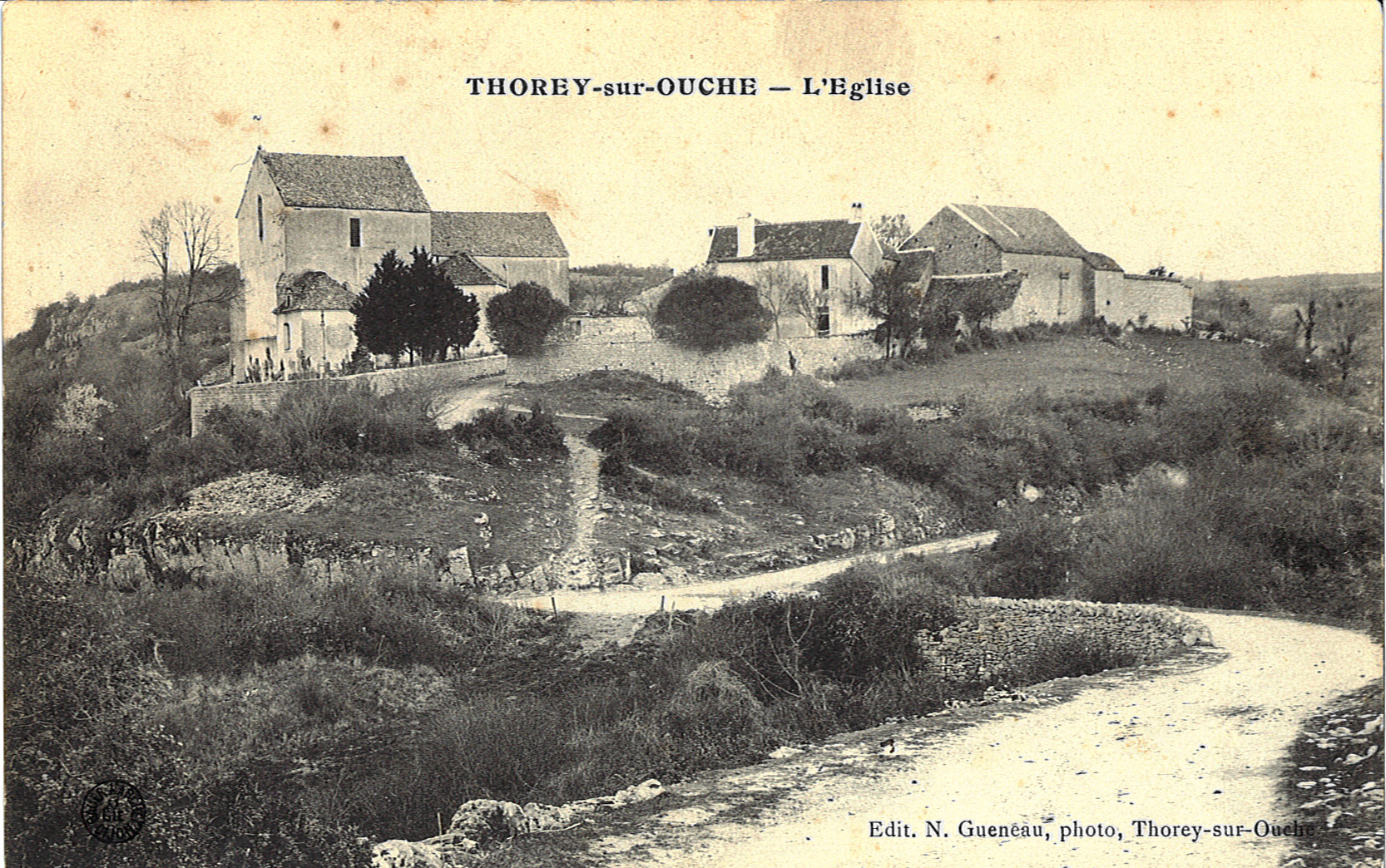 Eglise et presbytère de Thorey-sur-Ouche